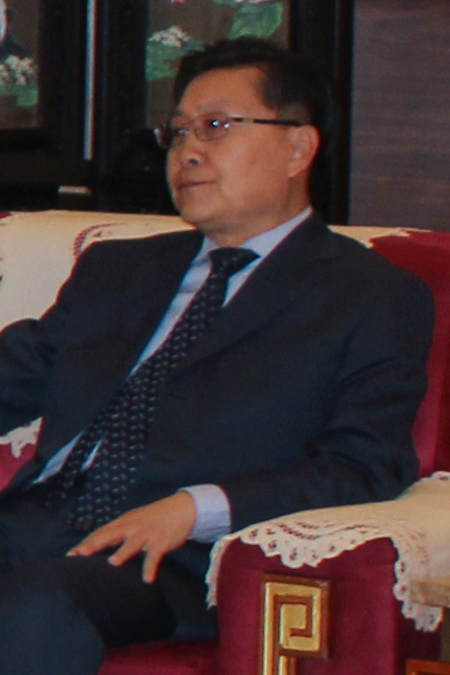 2018.gada 12.janvāris. Saeimas priekšsēdētāja Ināra Mūrniece kopā ar citu Baltijas un Ziemeļvalstu parlamentu spīkeriem kopīgās vizītes Ķīnā ietvaros tiekas ar Sičuaņas provinces Tautas kongresa partijas sekretāru Vanu Dunminu (Wang Dongming). Foto: Guntra Riņķe, Saeima Izmantošanas noteikumi: saeima.lv/lv/autortiesibas